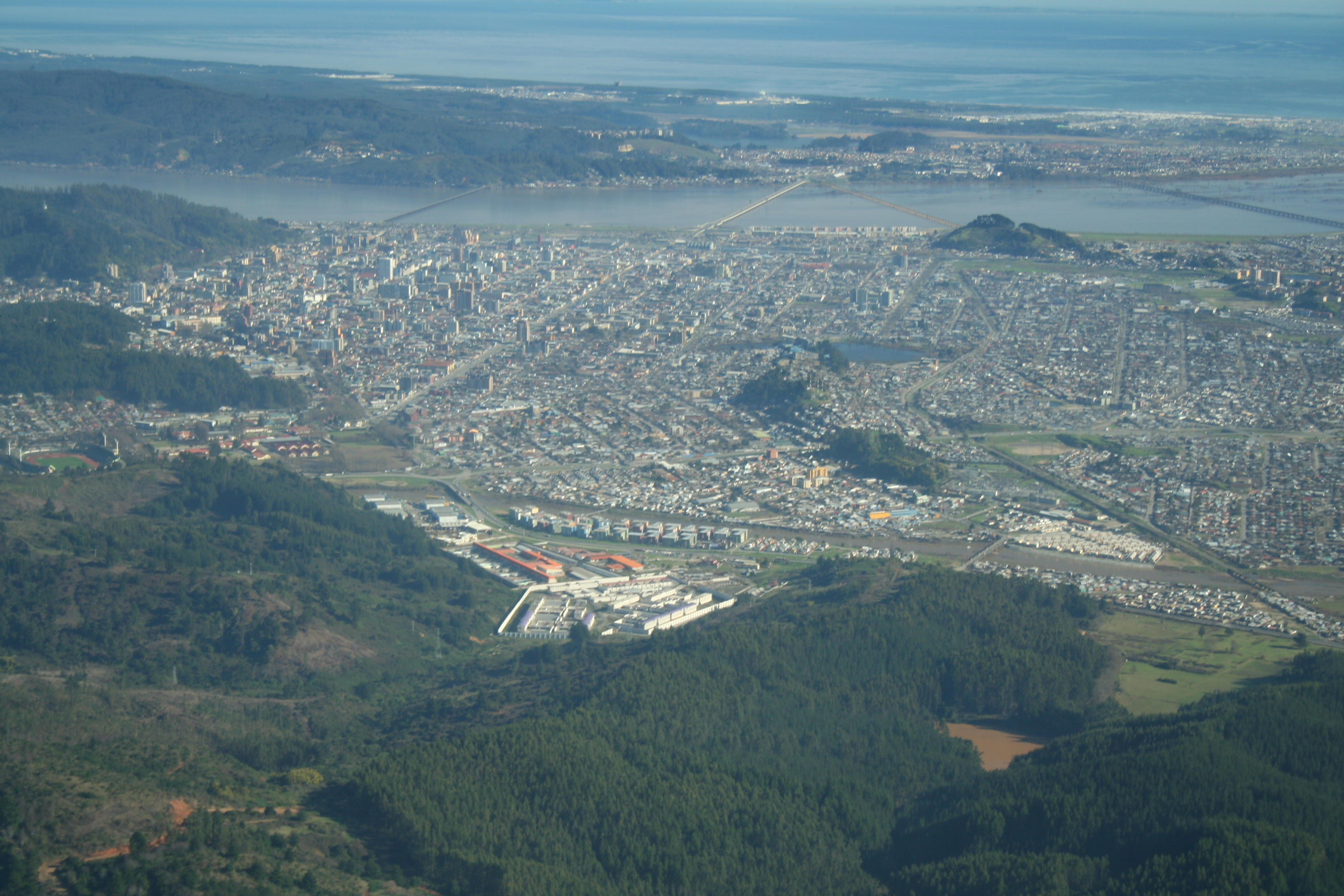 Fotografía aérea de Concepción, Chile.